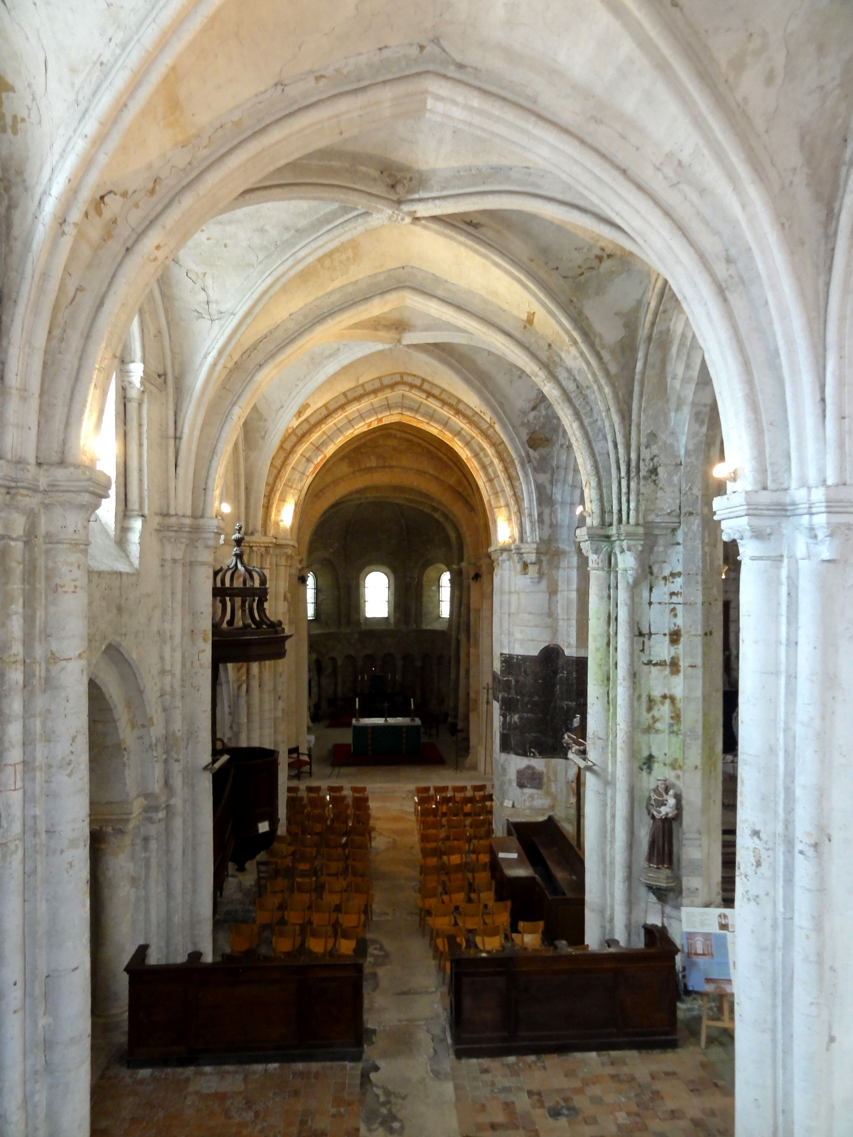 Nef, vue vers l'est.